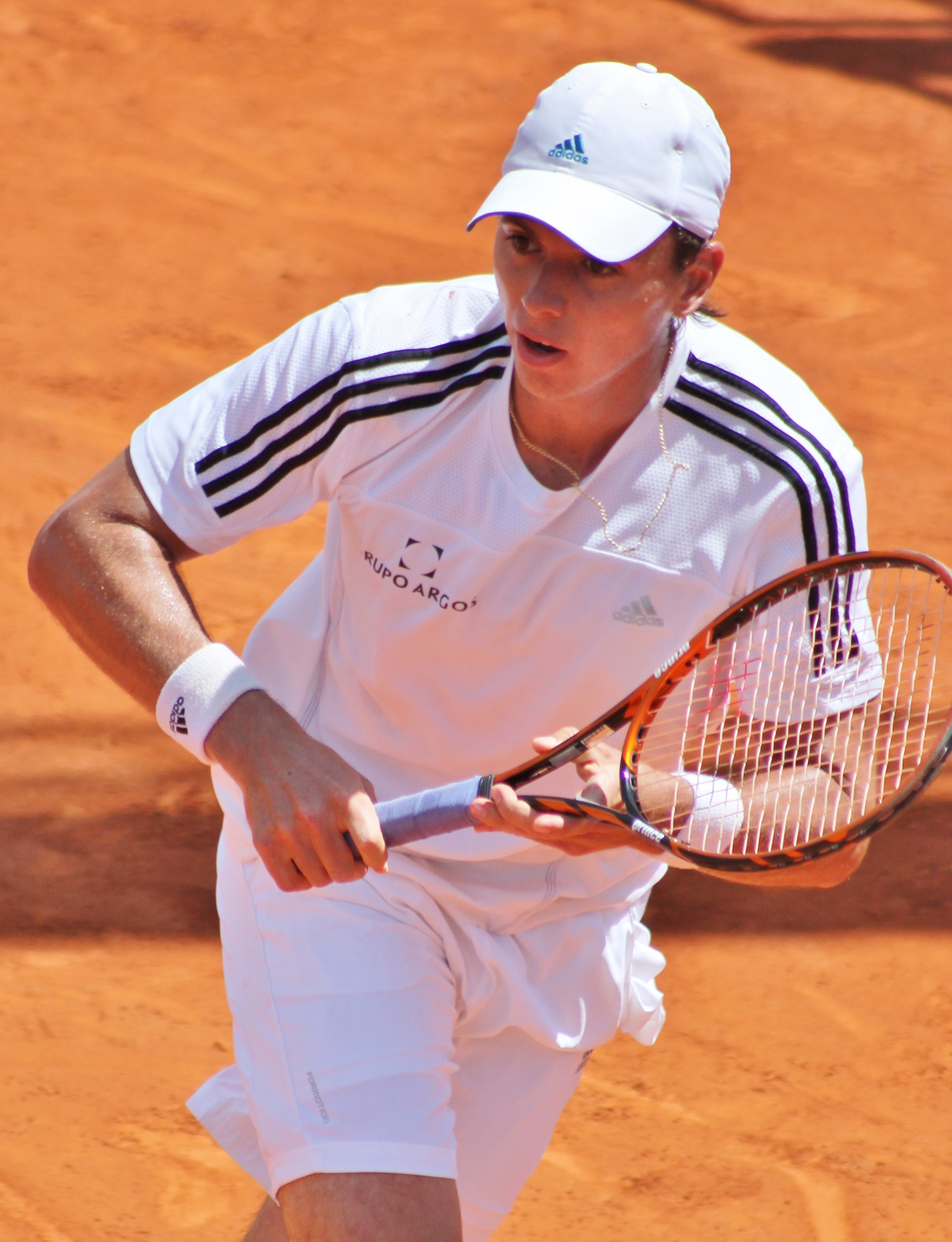 Gonzalez A. MA14 (10) - Copy